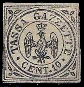 Последняя газетная налоговая марка Модены